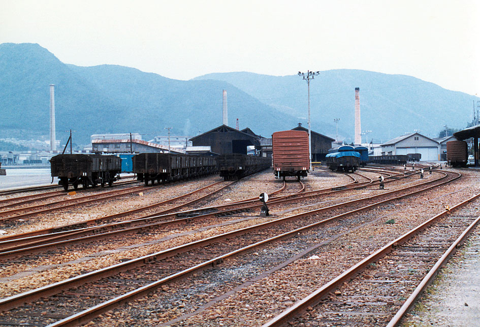 同和鉱業片上鉄道 片上駅ヤード